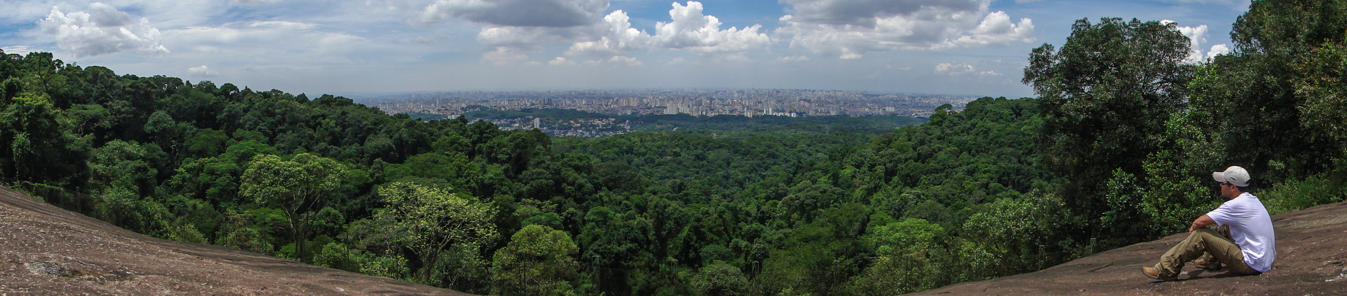 Vista panorâmica para a cidade de São Paulo a partir da Pedra Grande no Parque Estadual da Cantareira